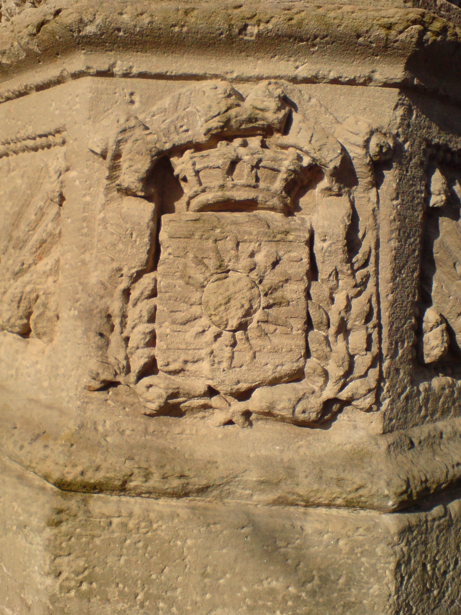 Armoirire de Lure